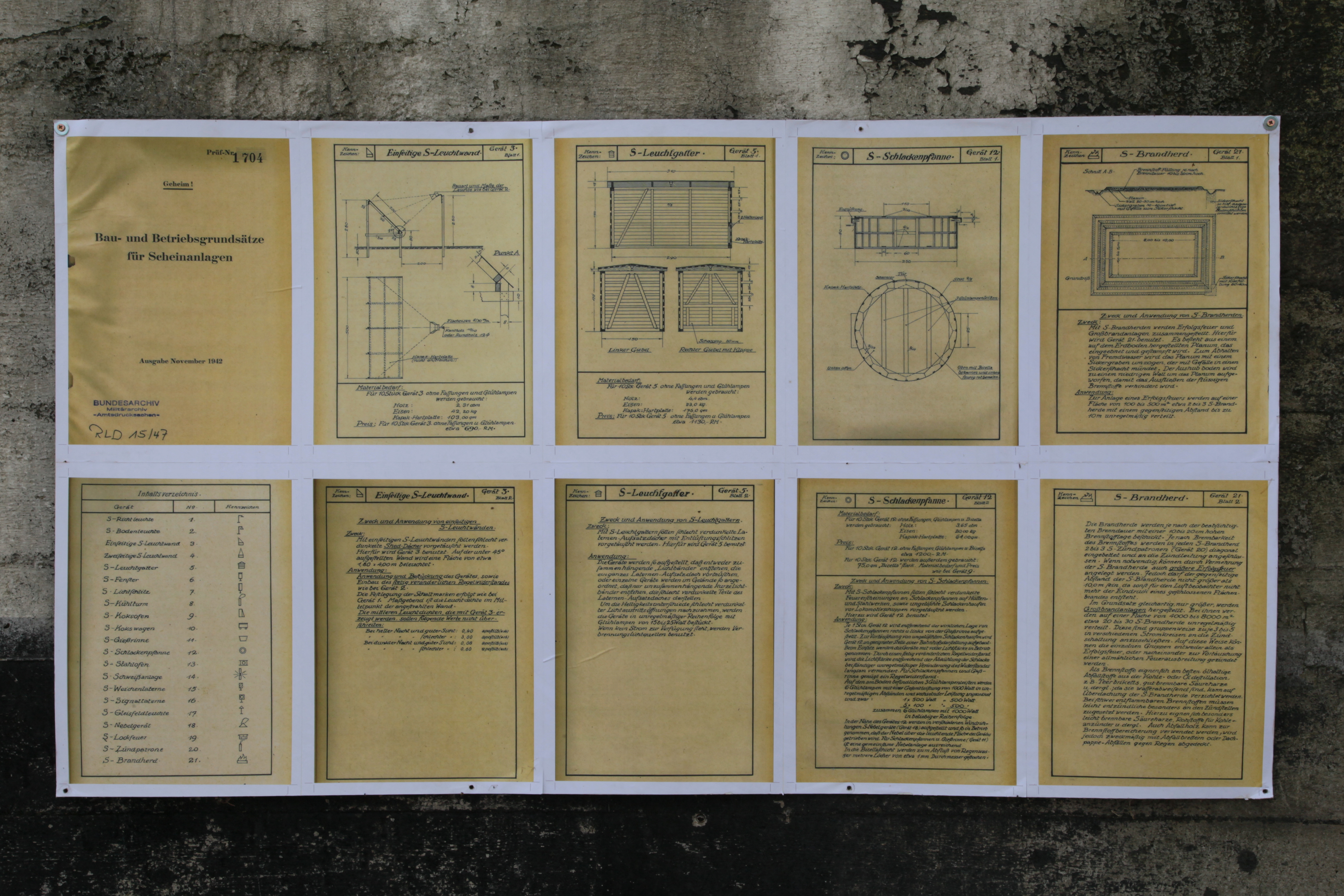 Leitbunker der Kruppschen Nachtscheinanlage, Asbachtal in Velbert